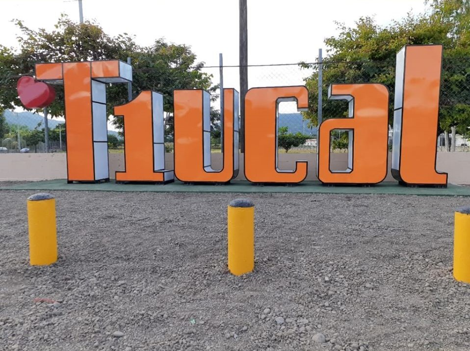 TIUCAL